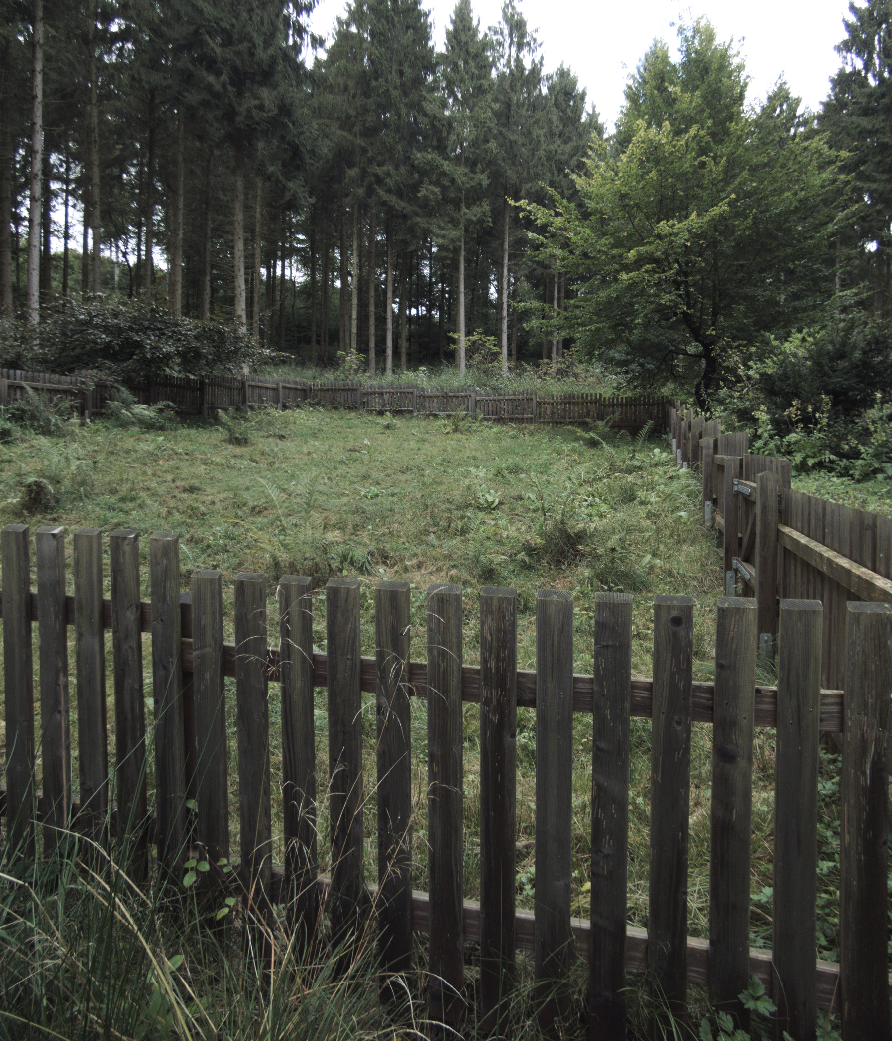 Eingefriedetes Areal des Waldfriedhofs Nienstedt in Niedersachsen 2017